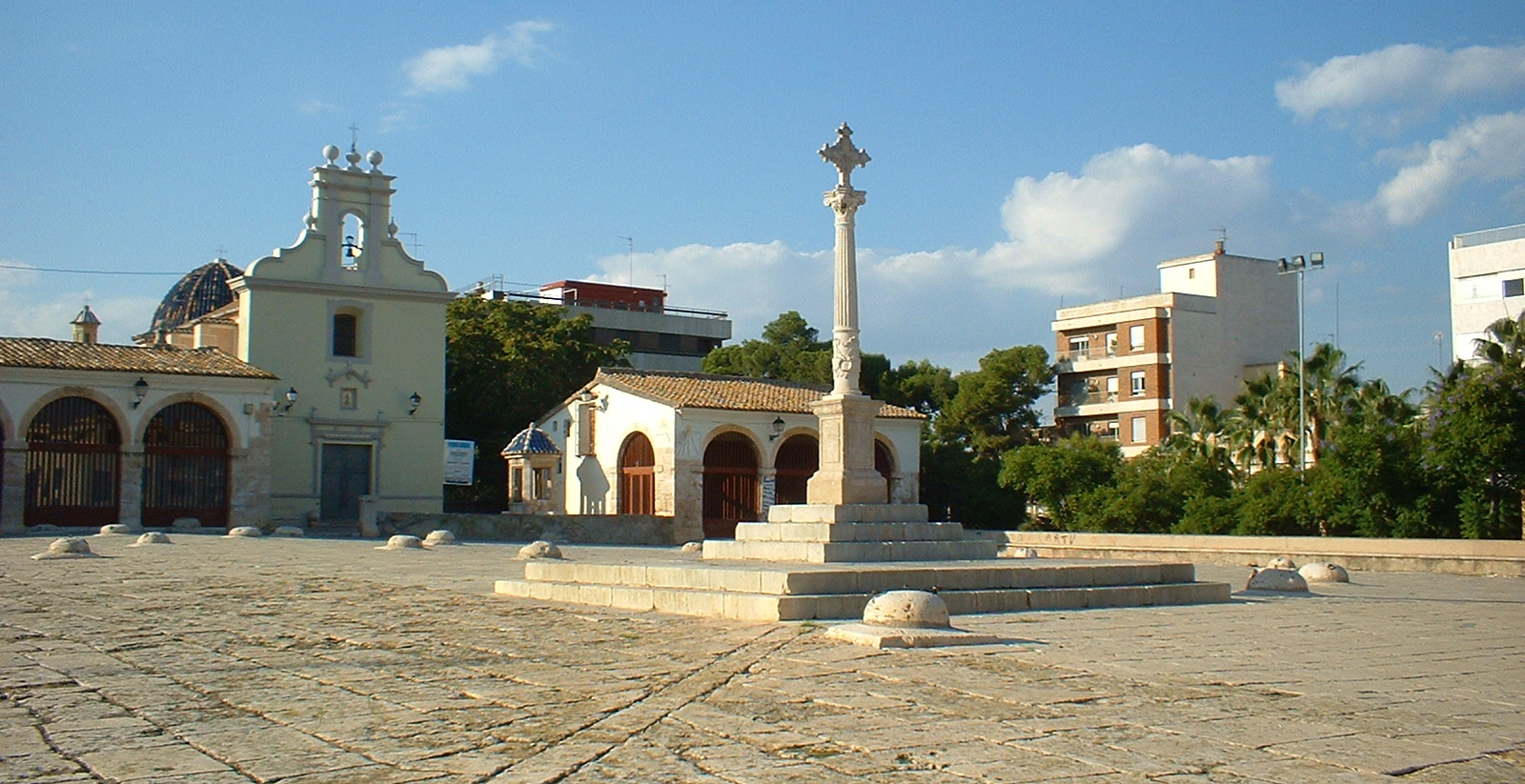 Les Sitges de Burjassot